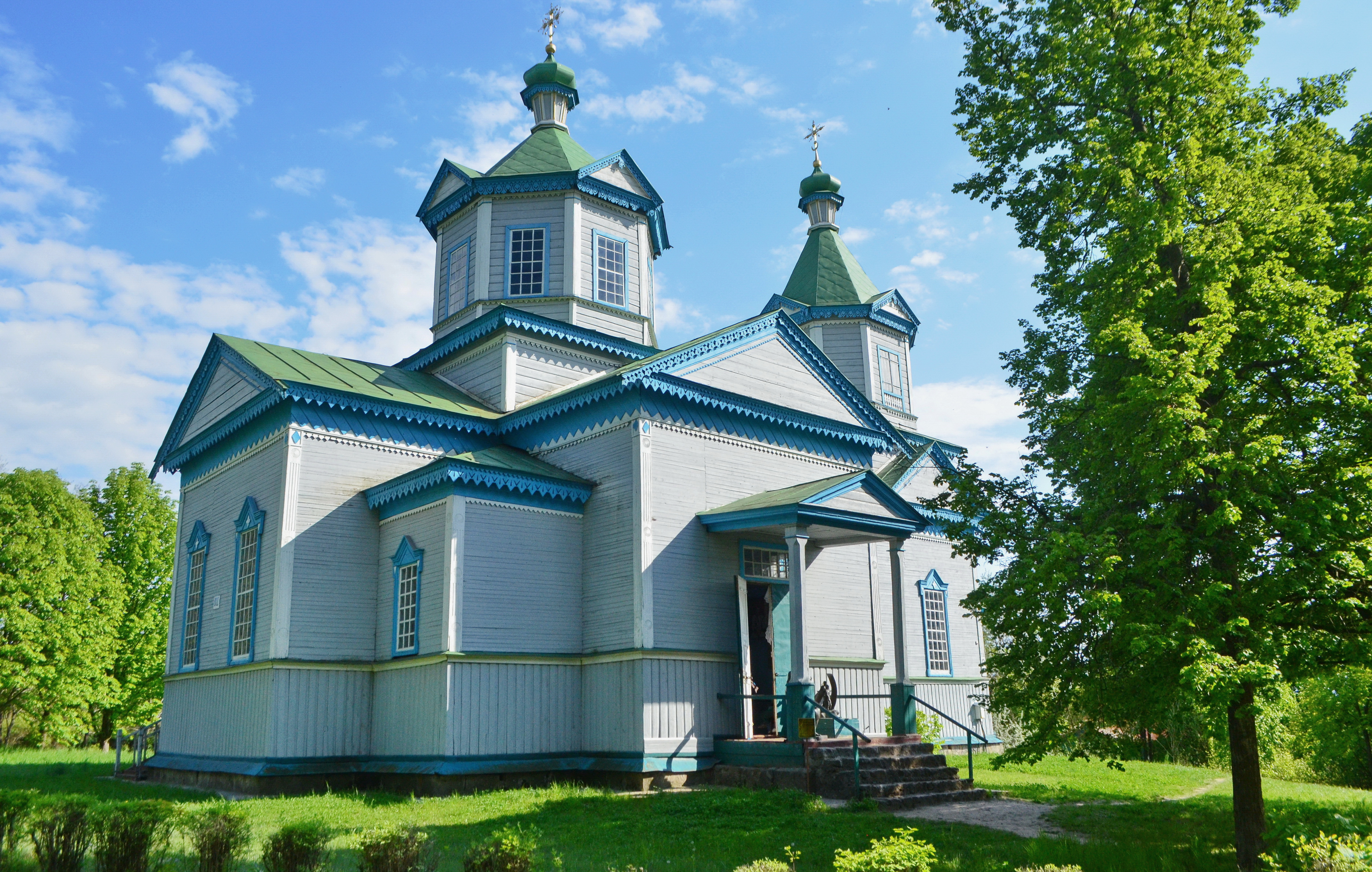 Переяслав-Хмельницький. Церква Параскеви П'ятниці з села В'юнище. 1892 р. Зараз - музей космосу.